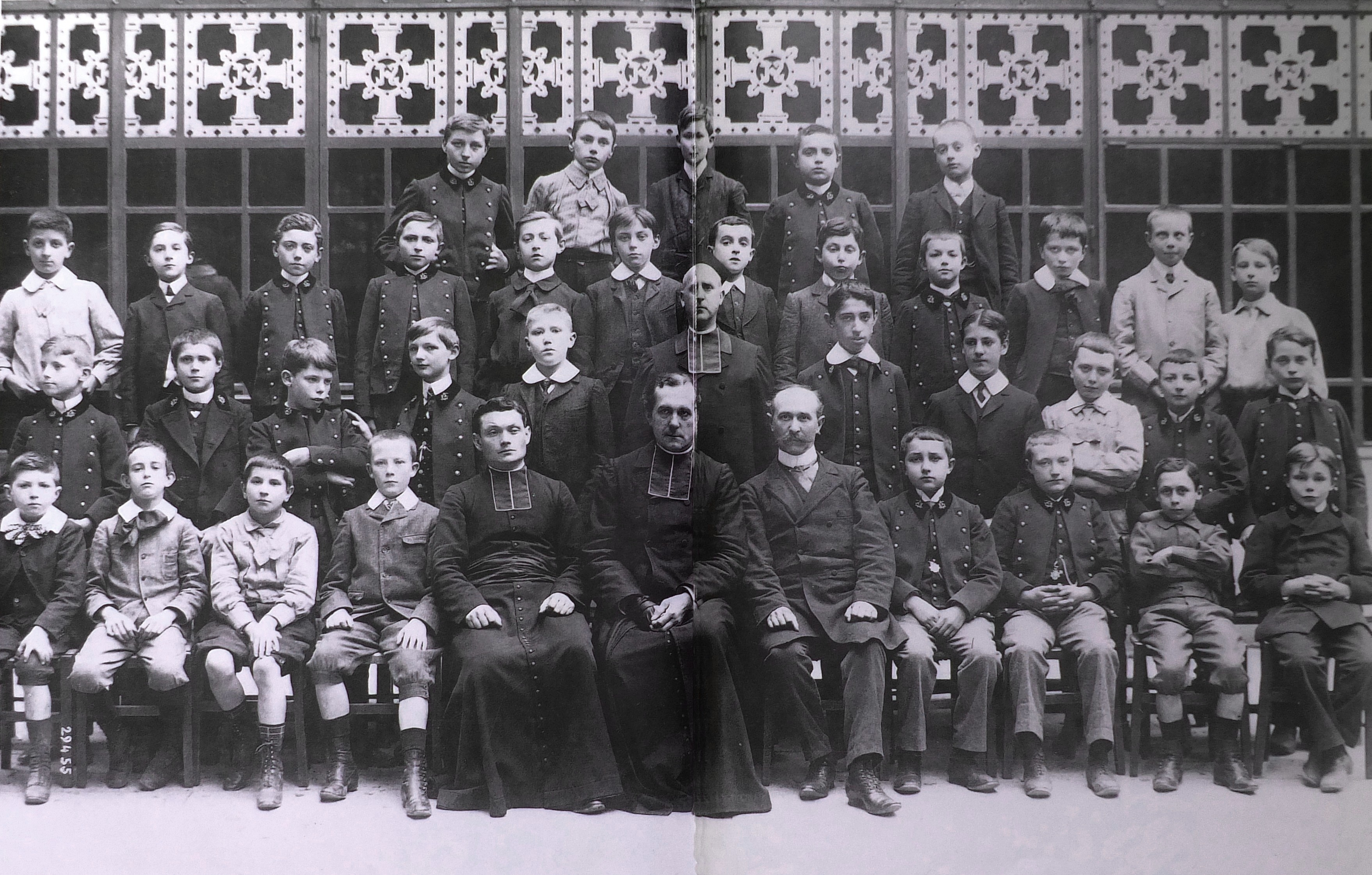 Classe du Collège de Sainte-Croix de Neuilly, année 1912. Photographe inconnu. Note : Au centre, l'abbé Litter, directeur, et derrière lui l'abbé Maillard. L'abbé Maillard quitte Sainte-croix en 1909, la date 1912 donnée sur le livre source, avec le titre "Chez les bons pères", semble erronée, une autre photo datée de 1906, publiée dans Sainte-Croix, imprimerie Tournon (1964), lui est très semblable mais avec d'autres élèves.